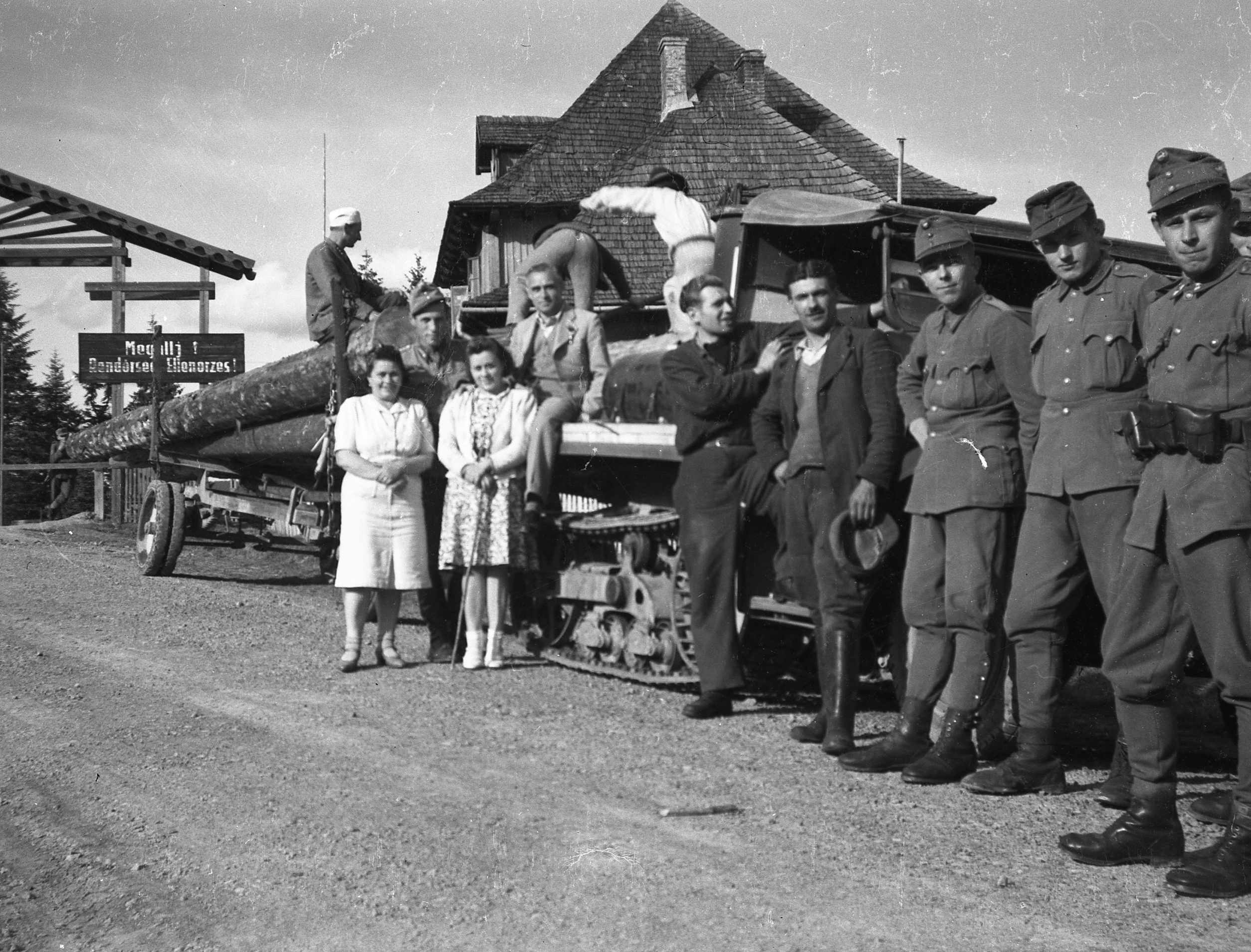 a magyar-szovjet határ 1940-ben.Hungarian-Soviet border in 1940 Location: Ukraine, Uzhok Tags: border crossing, tow truck, Transcarpathia, track Title: a magyar-szovjet határ 1940-ben.